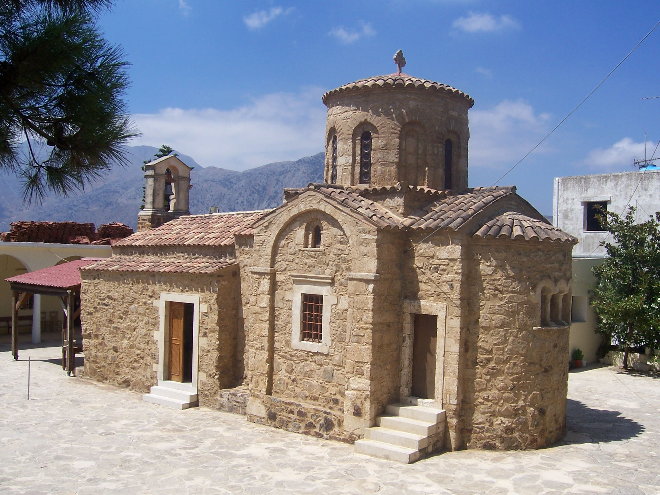 Monastère de Myriokefala (Crète)